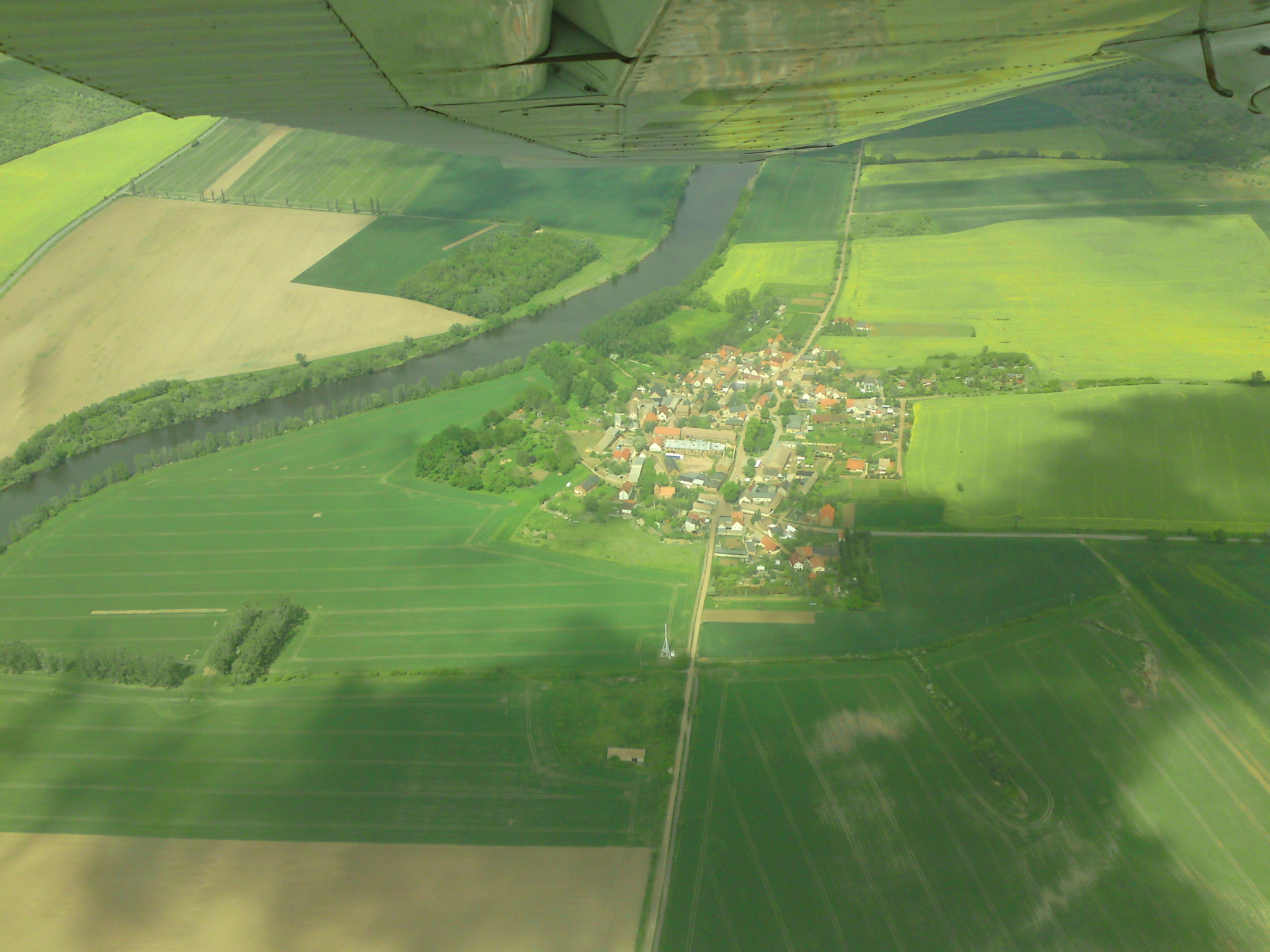 Luftbild von Döblitz an der Saale